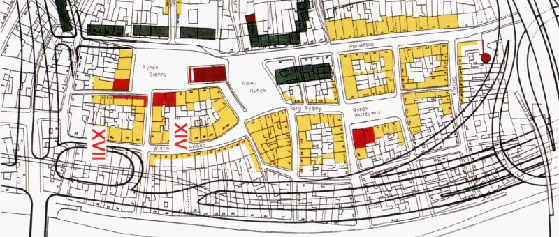 Plan Rewitalizacji Podzamcza (fragment), w internecie pojawia się także wersja z nieco innymi kolorami.